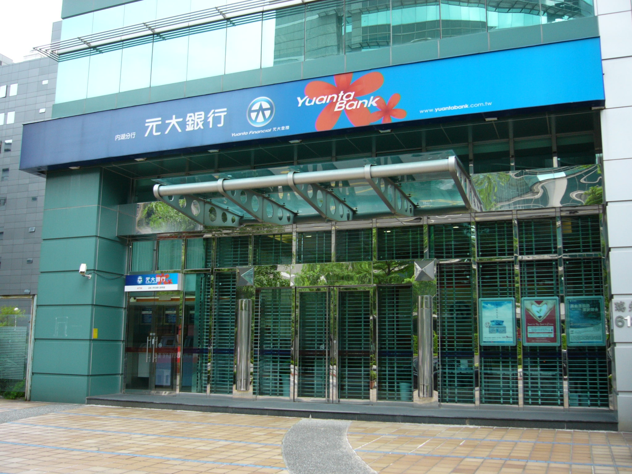 中文（台灣）: 元大商業銀行內湖分行，位於臺北市內湖區瑞光路618號1樓（長虹經貿大樓），2017年2月重訪時已搬離。